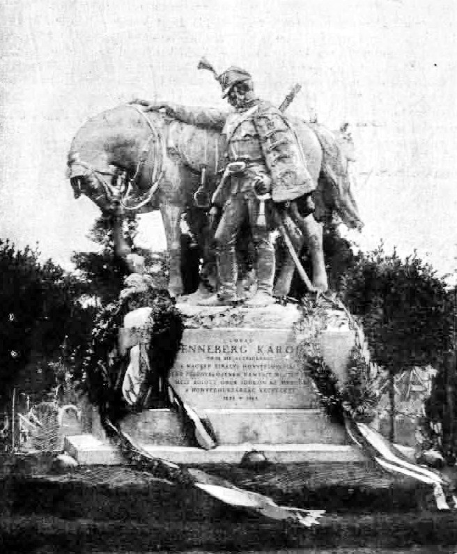 Henneberg Károly (1833–1888) honvéd huszár altábornagy, a honvéd lovasság megszervezője és első főfelügyelője sírja a Kerepesi temetőben. Strobl Alajos alkotása. 1894-ben készült fénykép